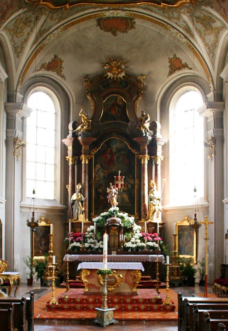 Der Hochaltar im Chor von St. Nikolaus, der kath. Stadtpfarrkirche von Mühldorf am Inn, Landkreis Mühldorf am Inn, Oberbayern. Der barocke Altar wurde 1774 geschaffen.